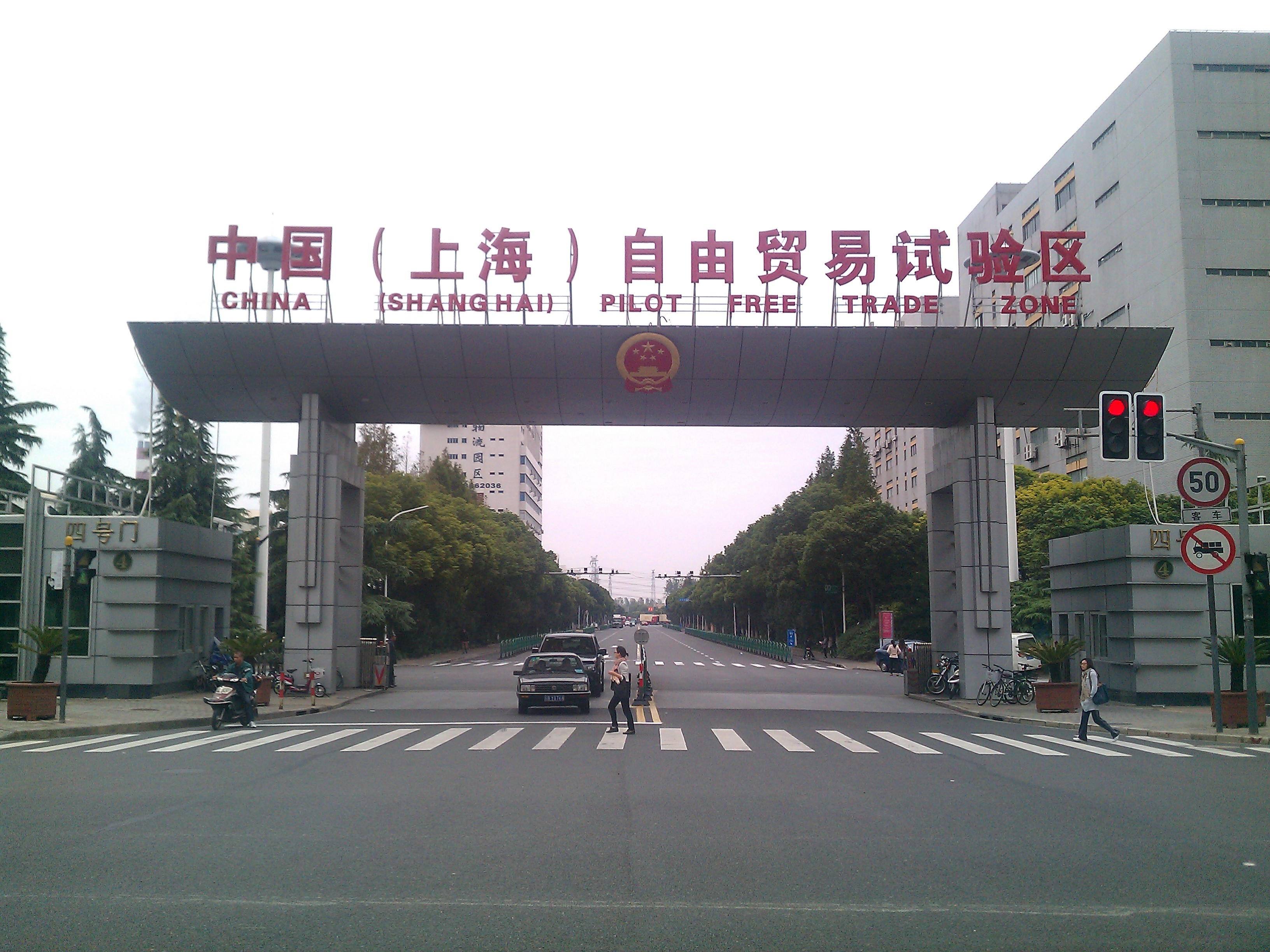 中文（中国大陆）: 中国（上海）自由贸易试验区四号门。